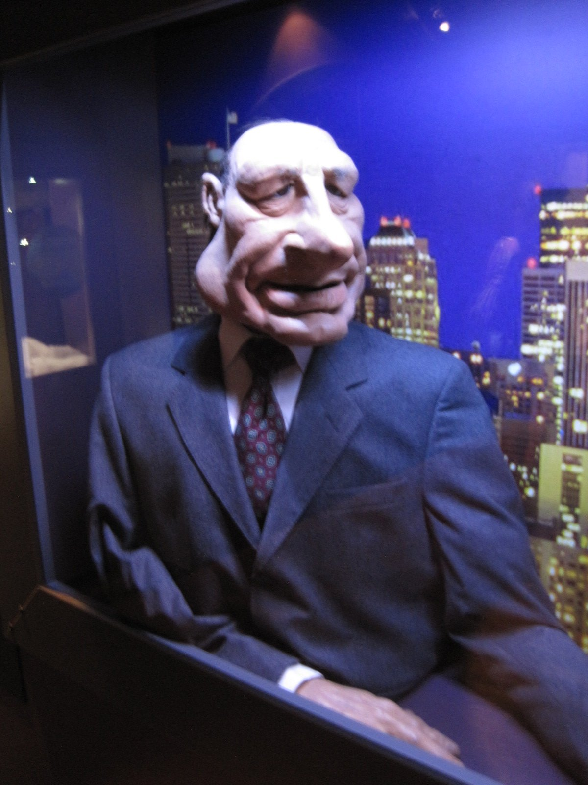 Jacques Chirac - Guignols de l'info - Canal+ - Exposition de marionettes de la citadelle de Besançon